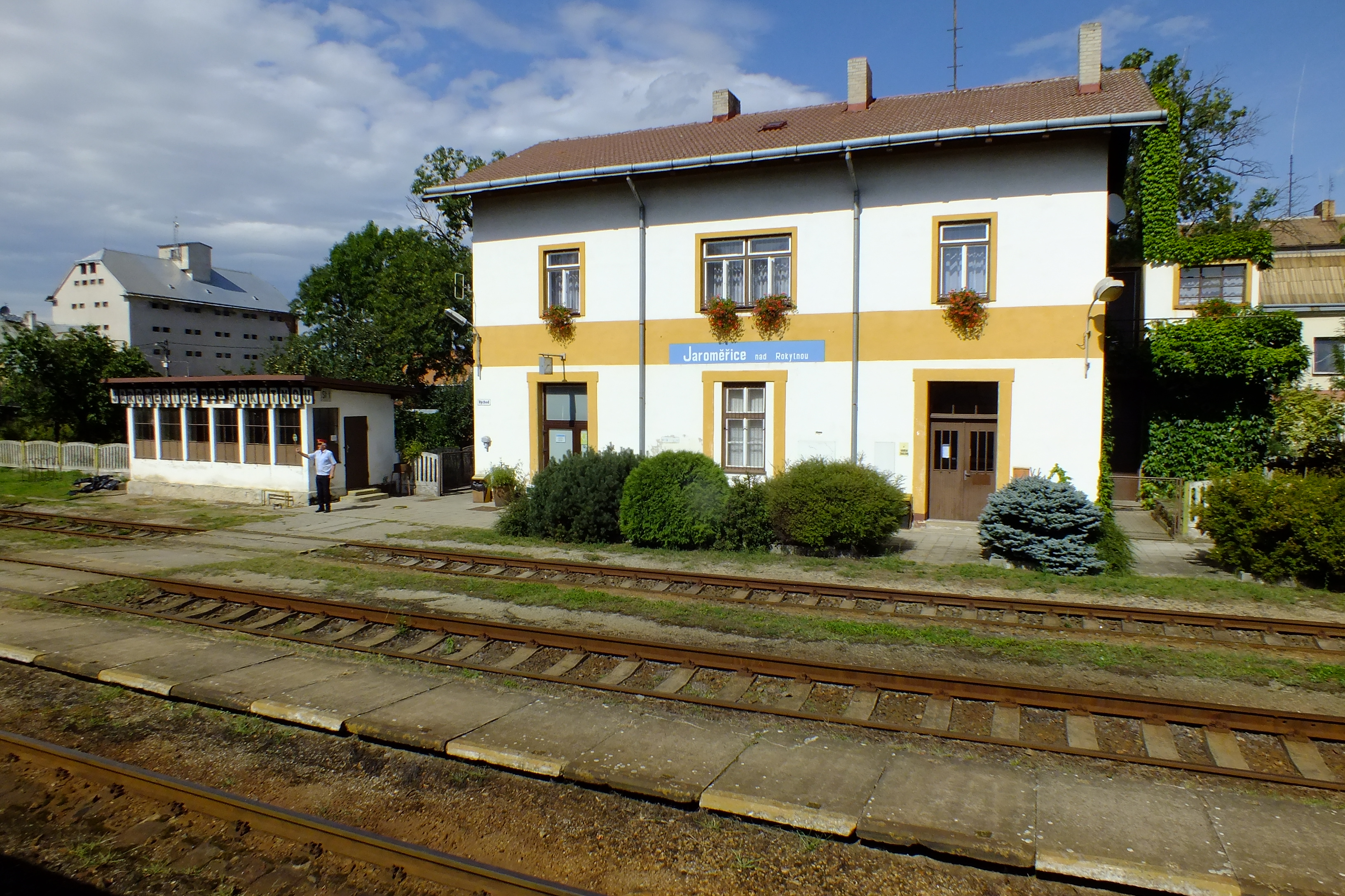 Staniční Budova